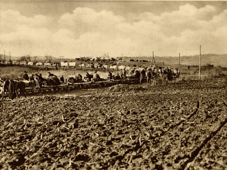 Feldbahn zwischen der Eisenbahnstation Arangjelovac (Aranđelovac) und Grn. Milanovac (Gornji Milanovac)